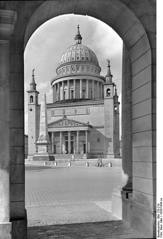 Potsdam.- Nikolaikirche